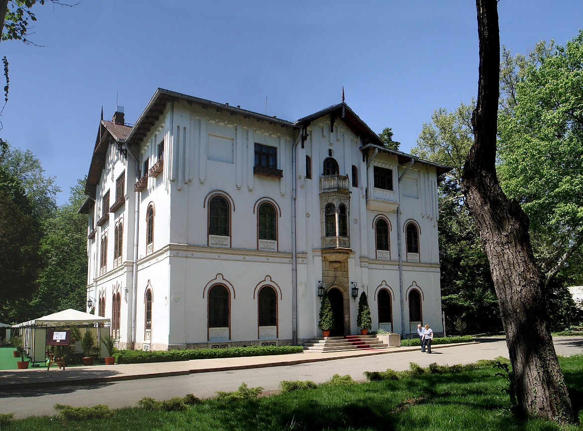 Palatul Știrbei din Buftea 01